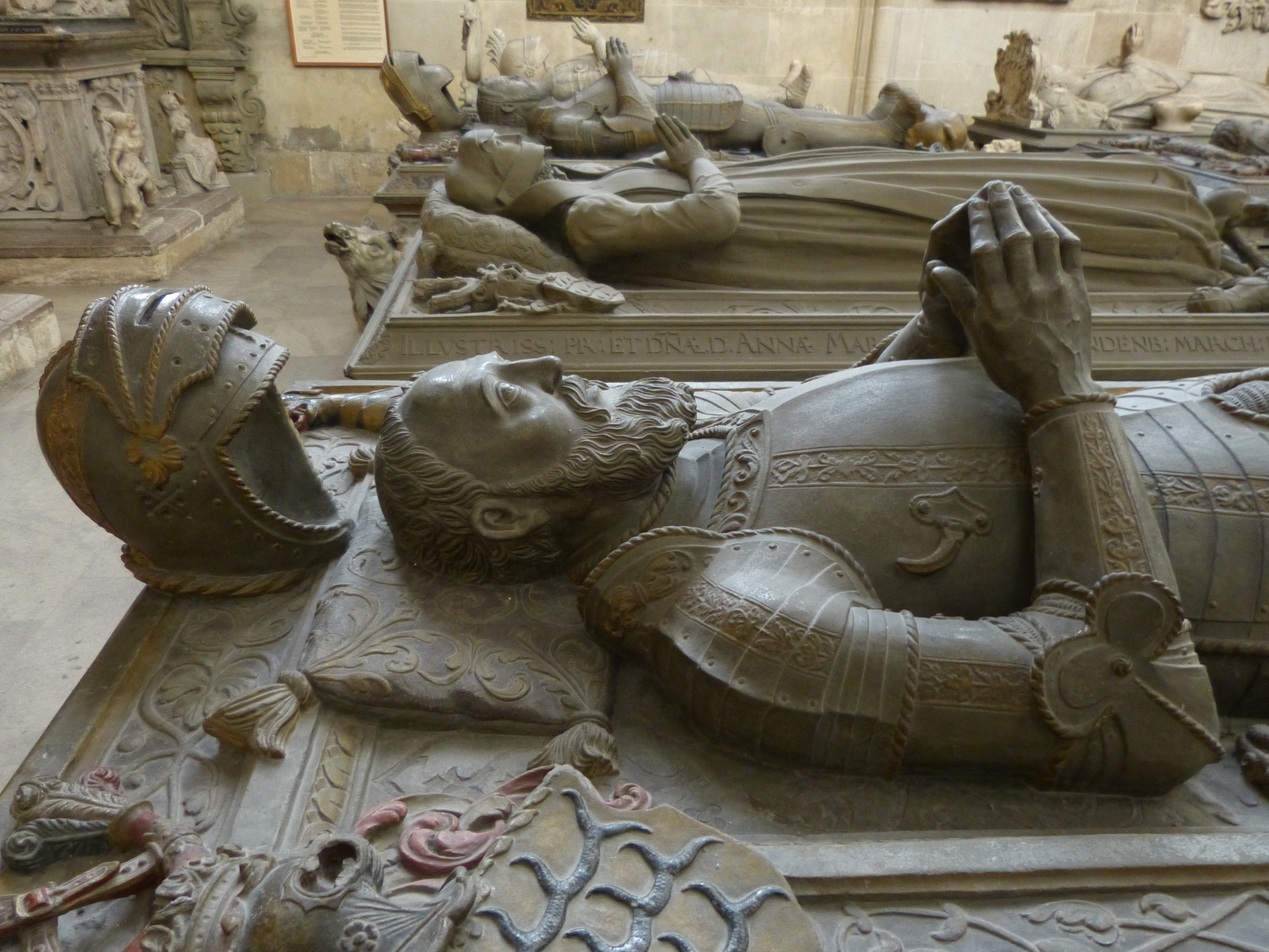 Grablege in der Stiftskirche von Tübingen, Baden-Württembergl